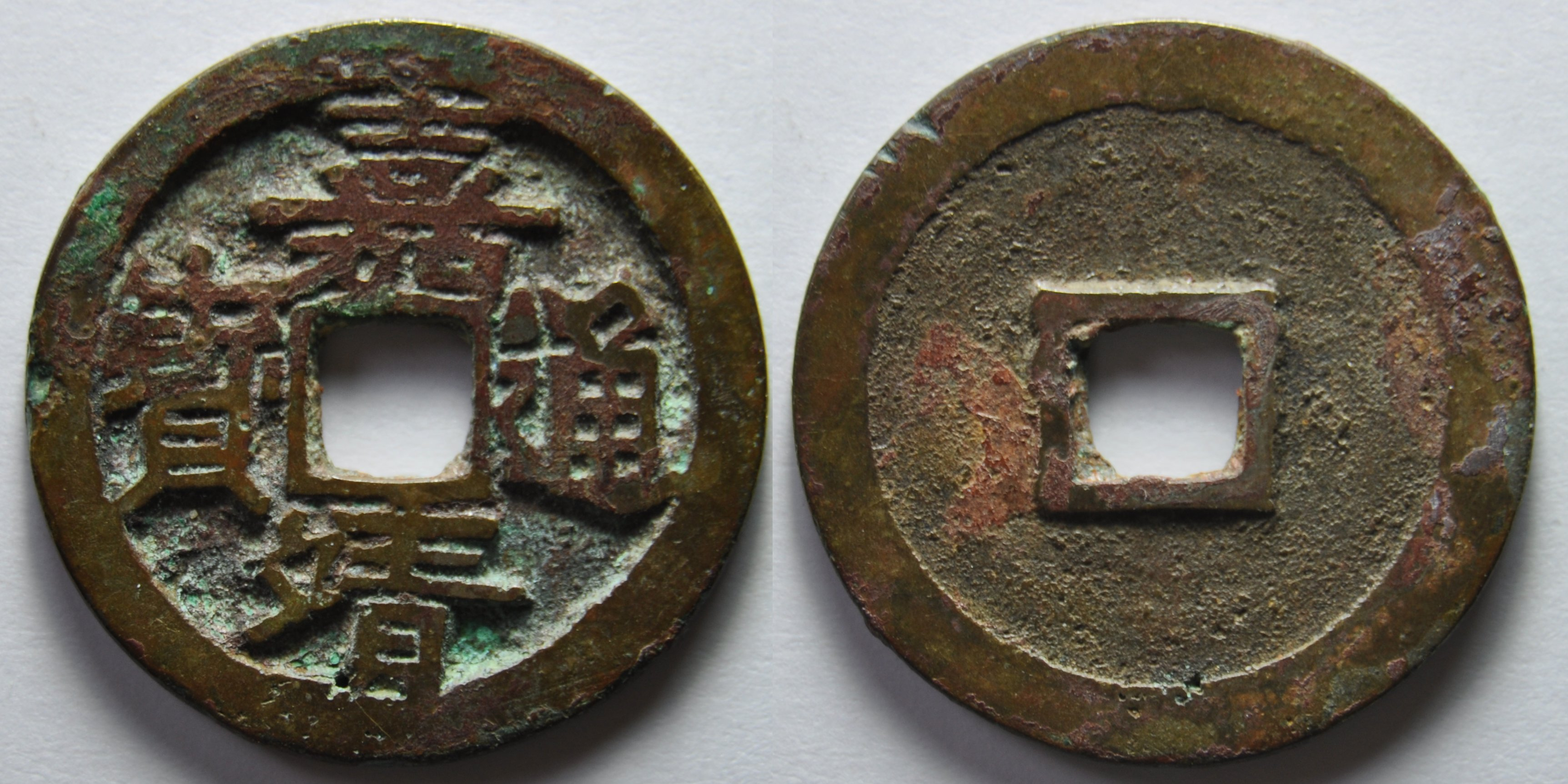 Une monnaie en bronze d'une sapèque (1 cash) de l'empereur Shi Zong, ère Jia Jing (1522-1567) de la dynastie Ming (1368-1644) en écriture angulaire et lecture en croix. A/ Jia Jing tong bao (monnaie courante de Jia Jing) R/ vide Dimension : 25.13 mm Poids : 4.5 g. Remarque : La fabrication des sapèques d'une unité démarre en 1527 avec une production de 100.000 ligatures. Le poids est de 1,2 qian ce qui correspond à ca 4,48 g. En 1563, le poids passe à 1,3 qian. Cette monnaie a donc été émise entre 1527 et 1563. Référence : H20.129 Indice de rareté : 12, commune d'après D.Hartill